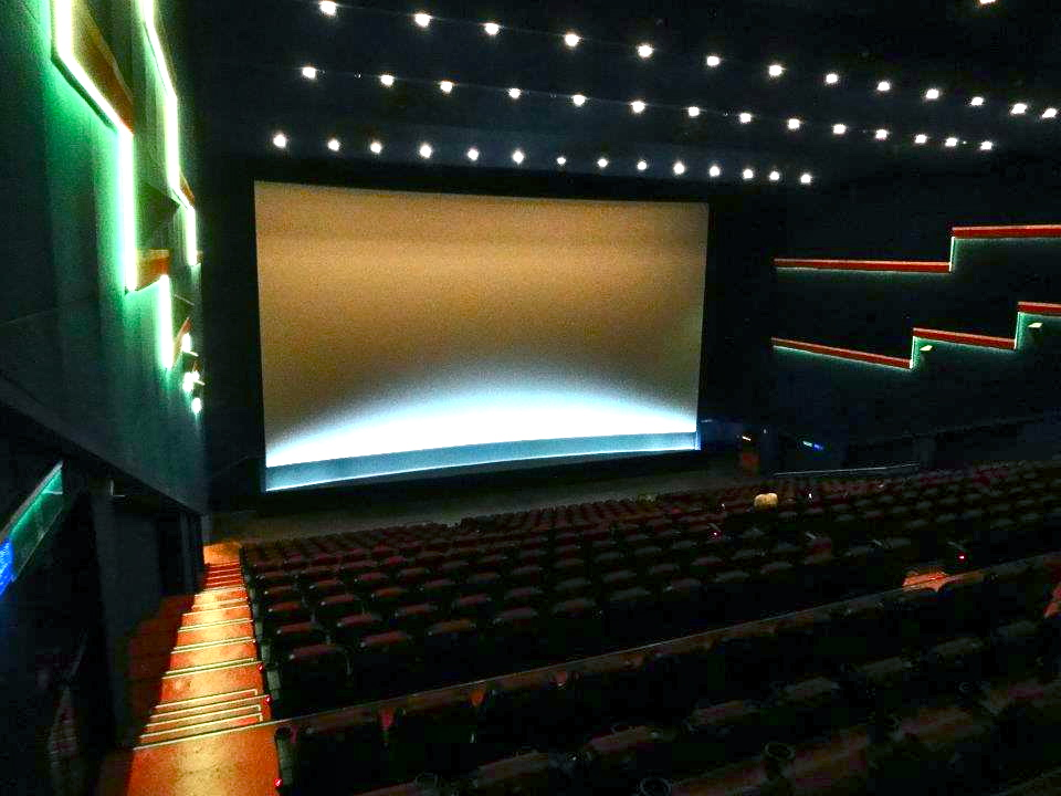 中文（台灣）: 西門町國賓大戲院一廳。